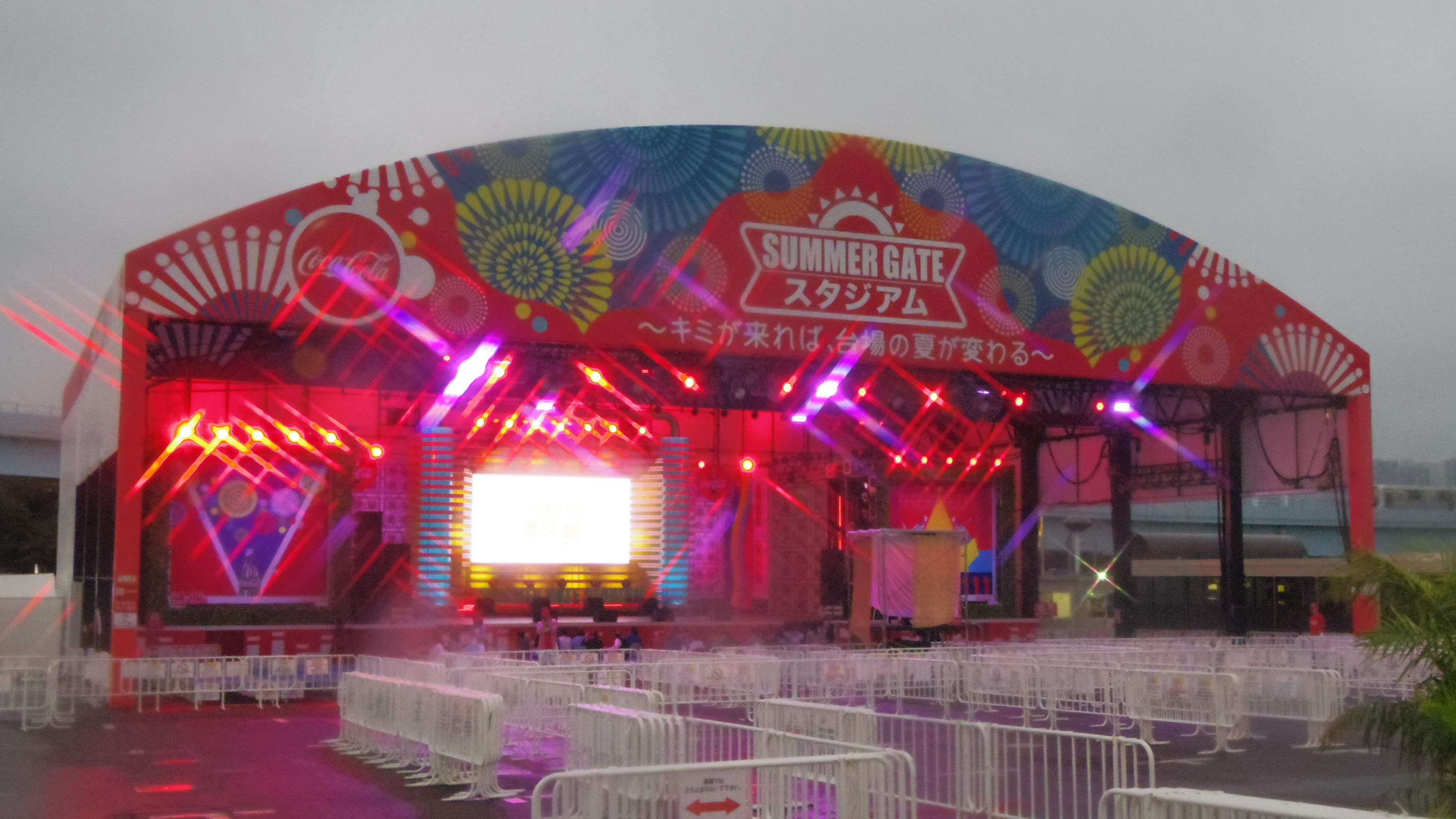 フジテレビの夏イベント「お台場夢大陸」(2015年)の「オマツリランド」の「SUMMER GATEスタジアム」。「めざましライブ」などのステージイベントで使用された。